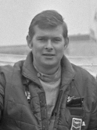 Tulpenralley Gilbert Stapelaere (links) en Andre Aerts op het dak van hun Ford Escort 1 mei 1969